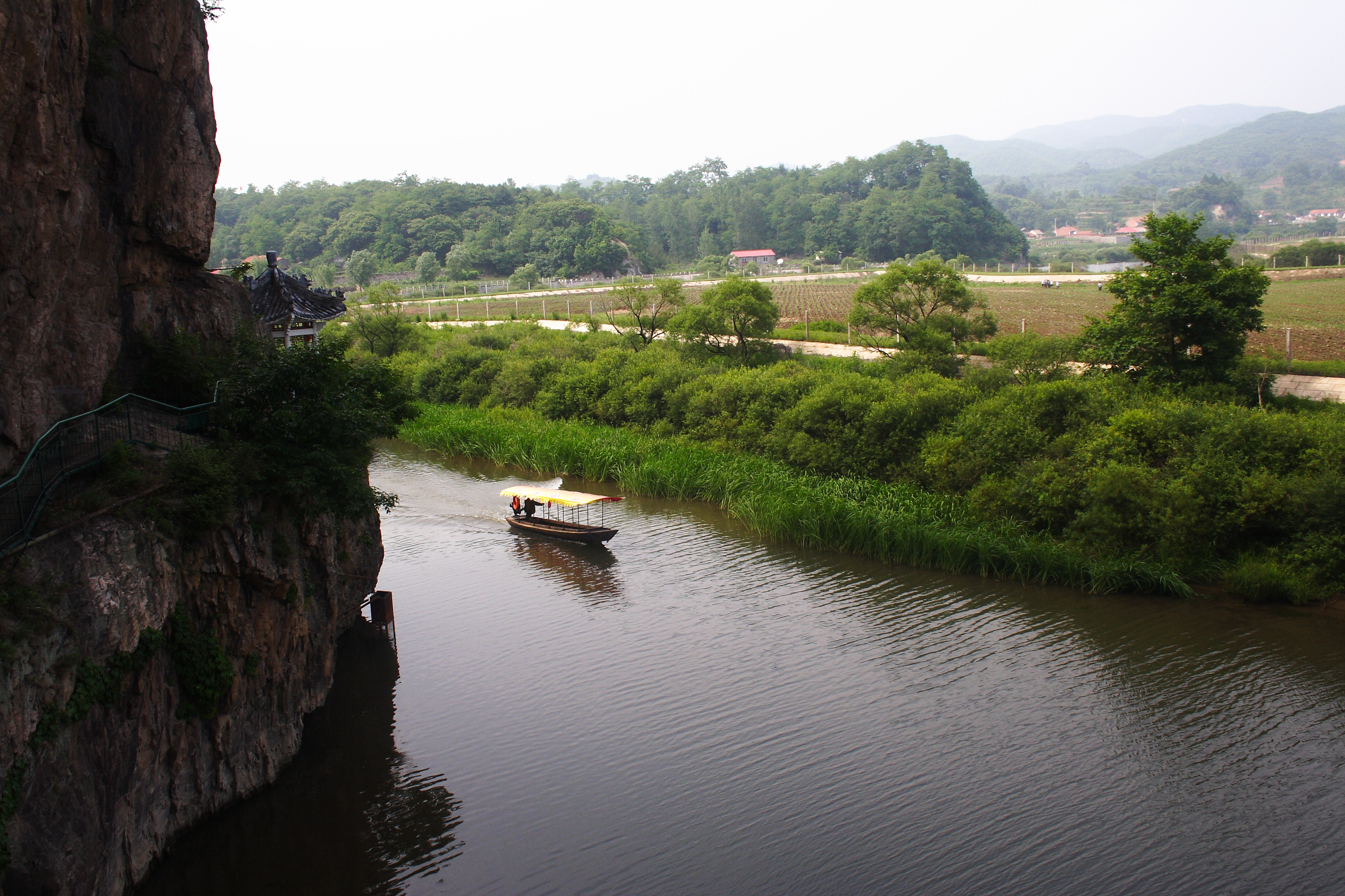 Non più di quindici metri tra Cina (a sinistra) e Corea (a destra). In mezzo, i barcaioli cinesi fanno il loro business con i turisti: 30 yuan per un giro a pochi metri dal "regno eremita". Hushan Changcheng China, 2009-06-14